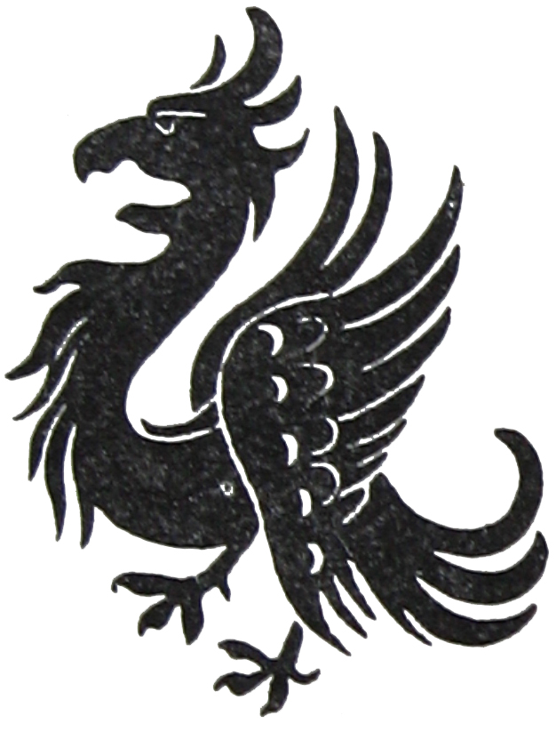 Dortmund, Marienkirche, Marienaltar, Altarmotiv (Brokatstoffe), Zeichnung